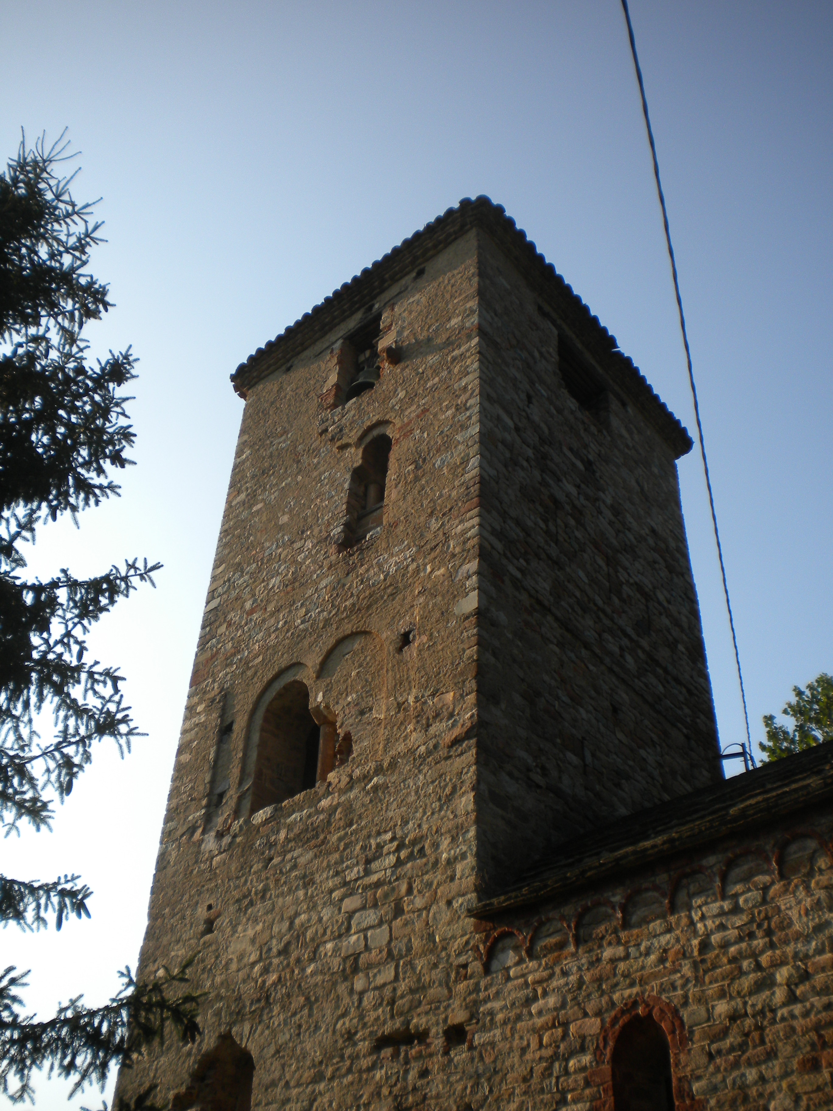 Torre del campanar de l'església de Sant Sadurní d'Osomort, al municipi homònim, a la comarca d'Osona.